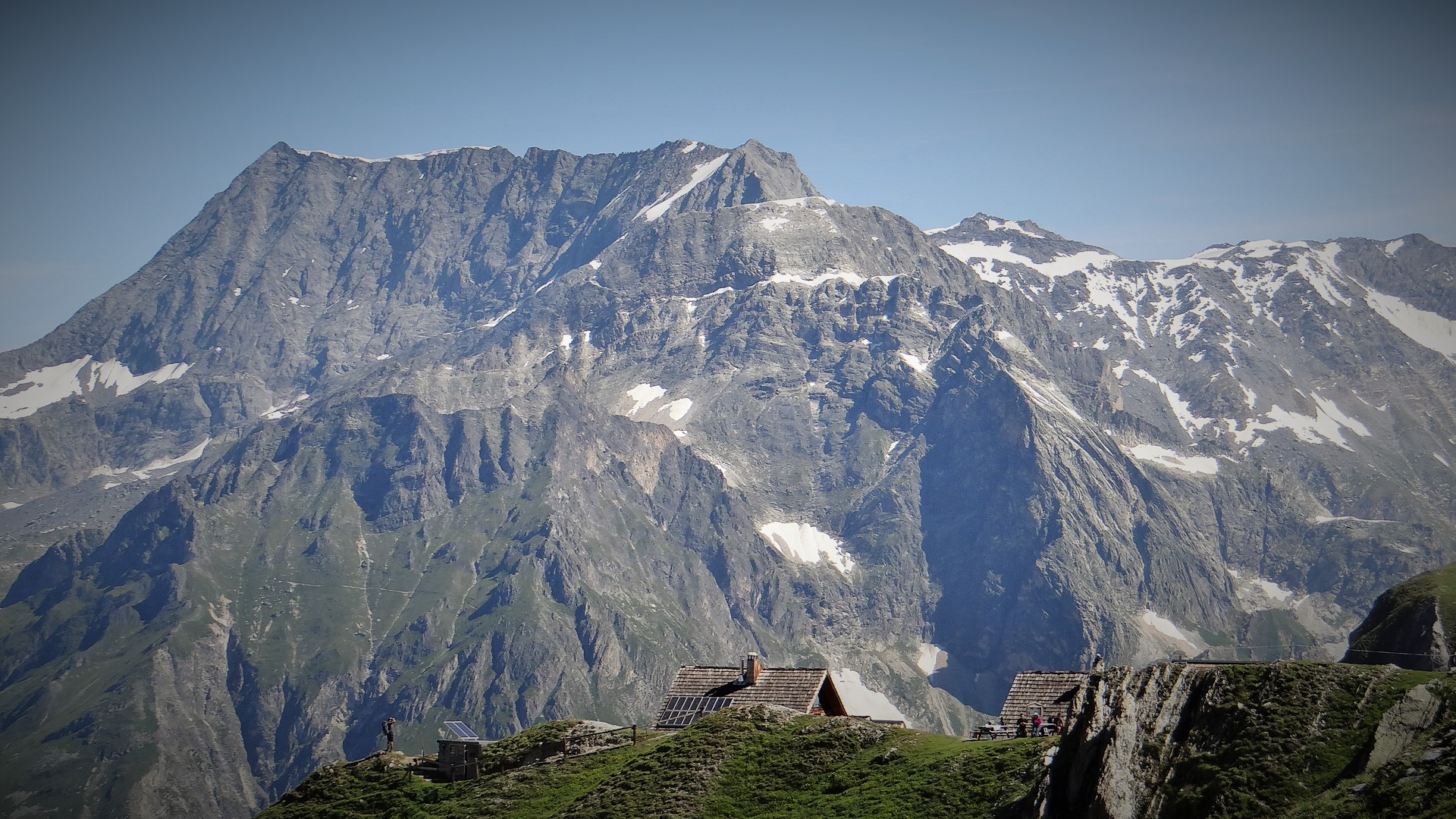 Refuge de la Vallette(2564m) et Grand Bec(3087m)